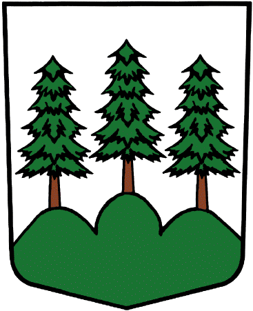 Wappen von Ried-Brig Kanton Wallis Schweiz